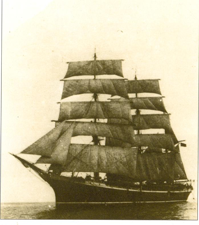 Galatea (Ex-Glenlee) a su llegada a España